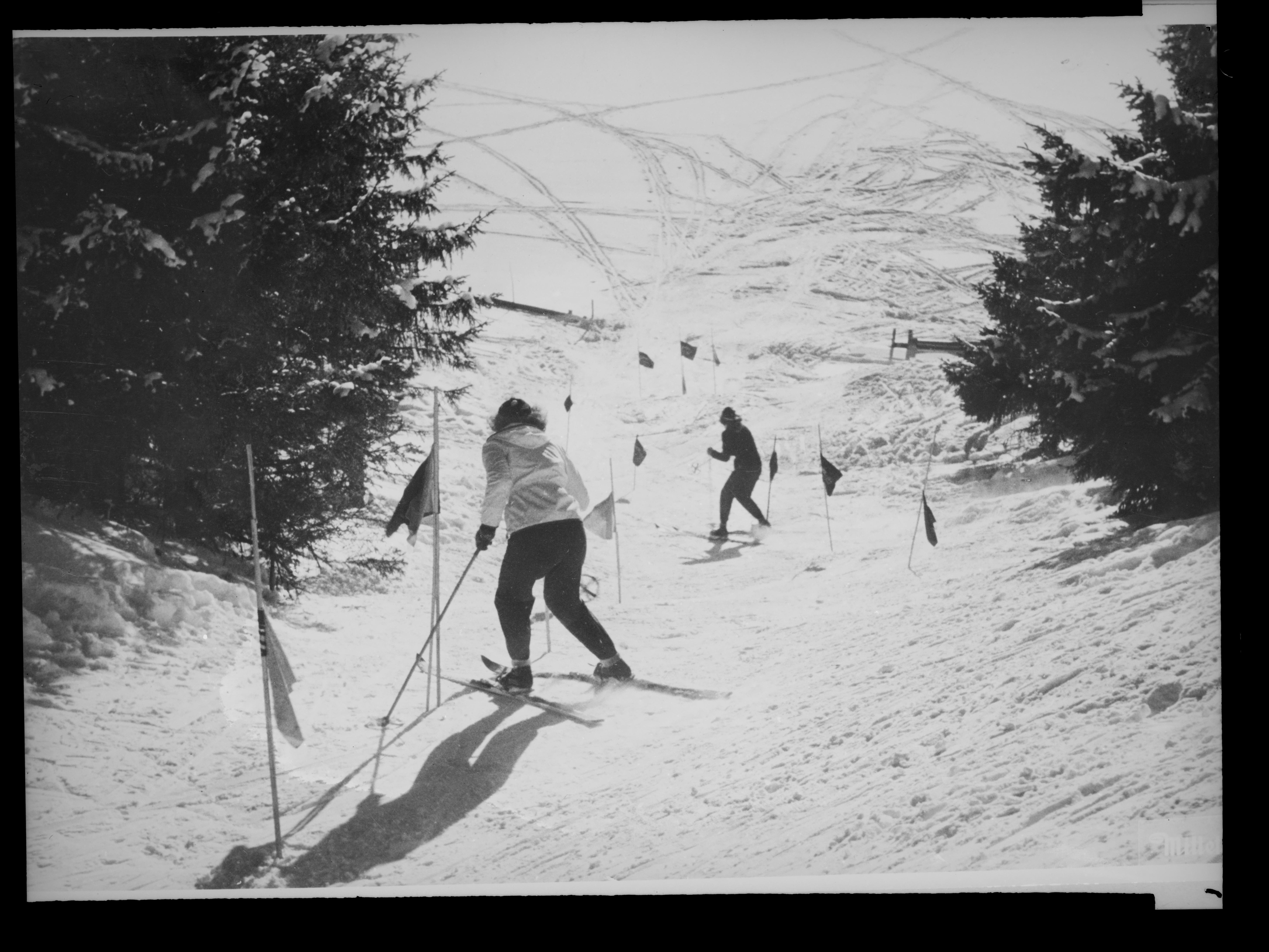 Bildet er hentet fra Nasjonalbibliotekets bildesamling. Anmerkninger til bildet var: Fotograf: ukjent